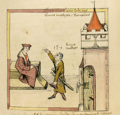 Der Torwart Hans Rüdiger Burckart legt den Eid ab. Volkacher Salbuch folio 413v